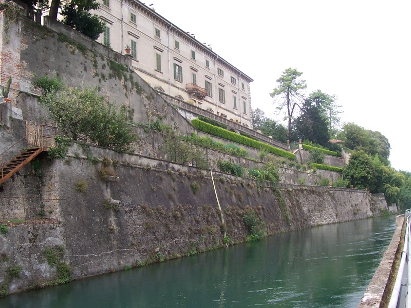 Vaprio d'Adda - Naviglio Martesana sotto Villa Melzi.